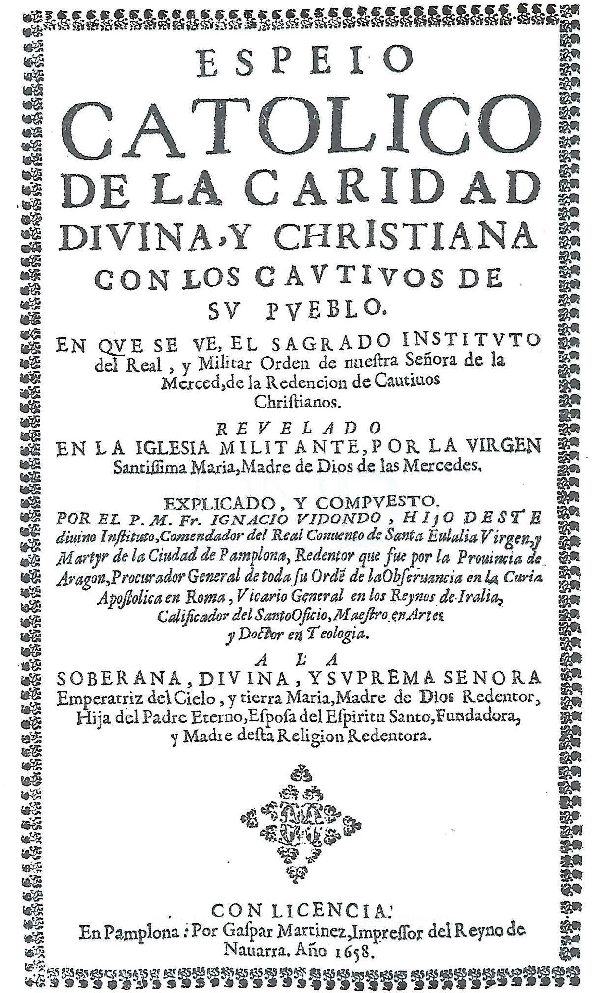 Gaspar Martínez, Pamplona, 1658. Espejo católico, del mercedario Ignacio Vidondo